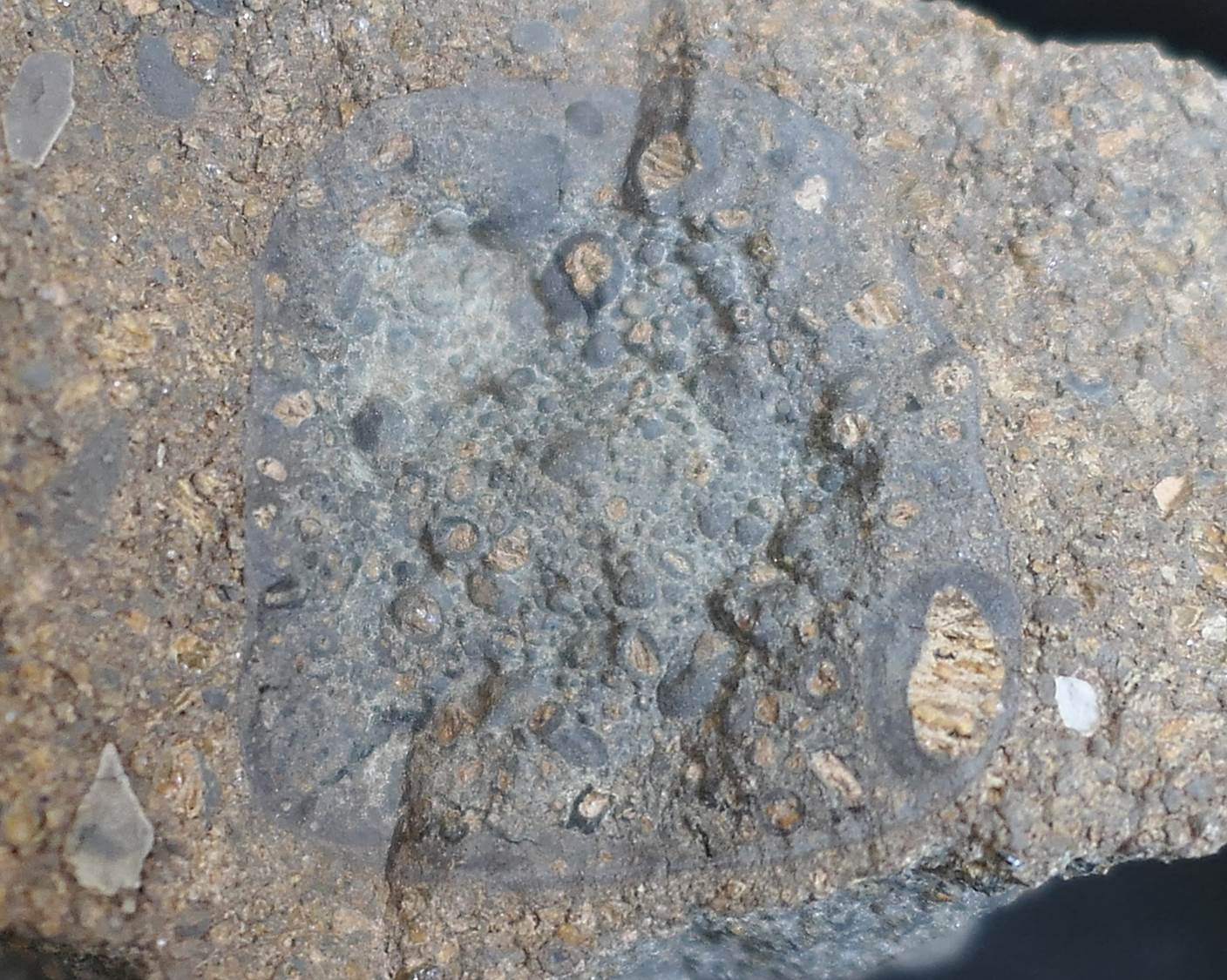 Lapilli-führender Tuffit vom Calverbühl.